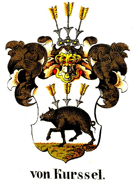 Wappen der schlesischen Linie Kurssel